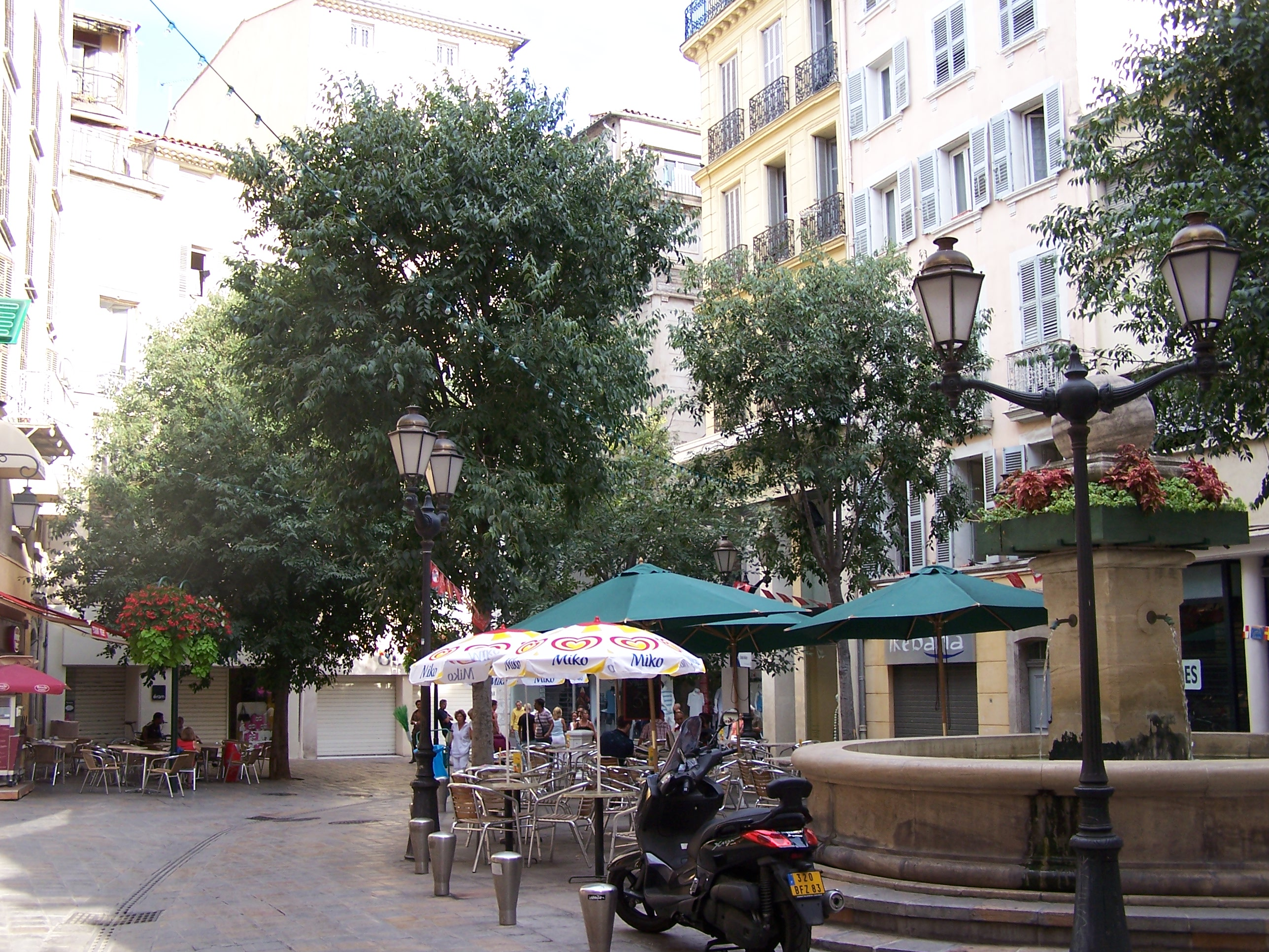 Vue de la place Ledeau